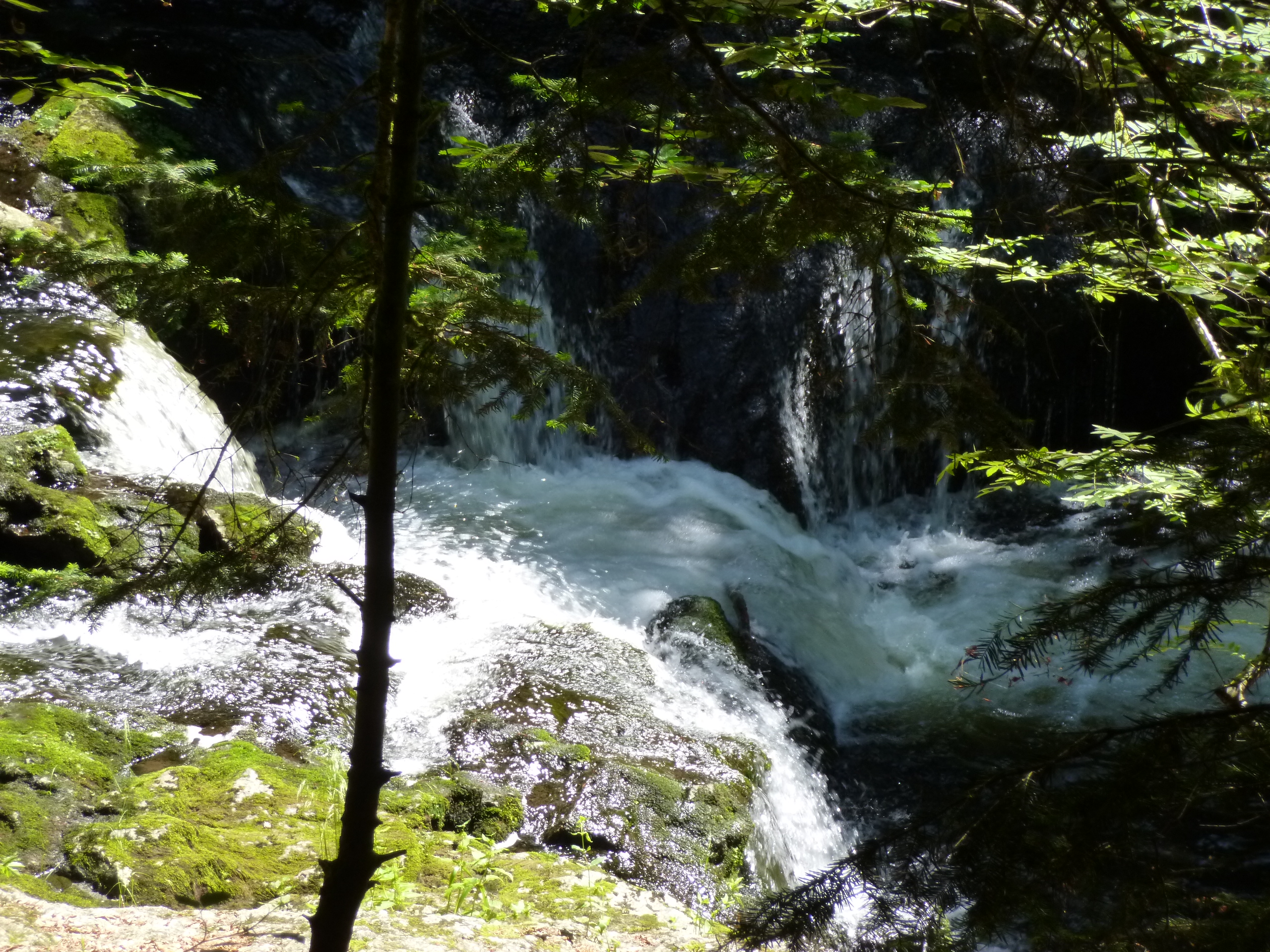 Kleiner Wasserfall in der Buchberger Leite; Wanderweg von Freyung nach Ringelai; Landschaftsschutzgebiet "Buchberger Leite"